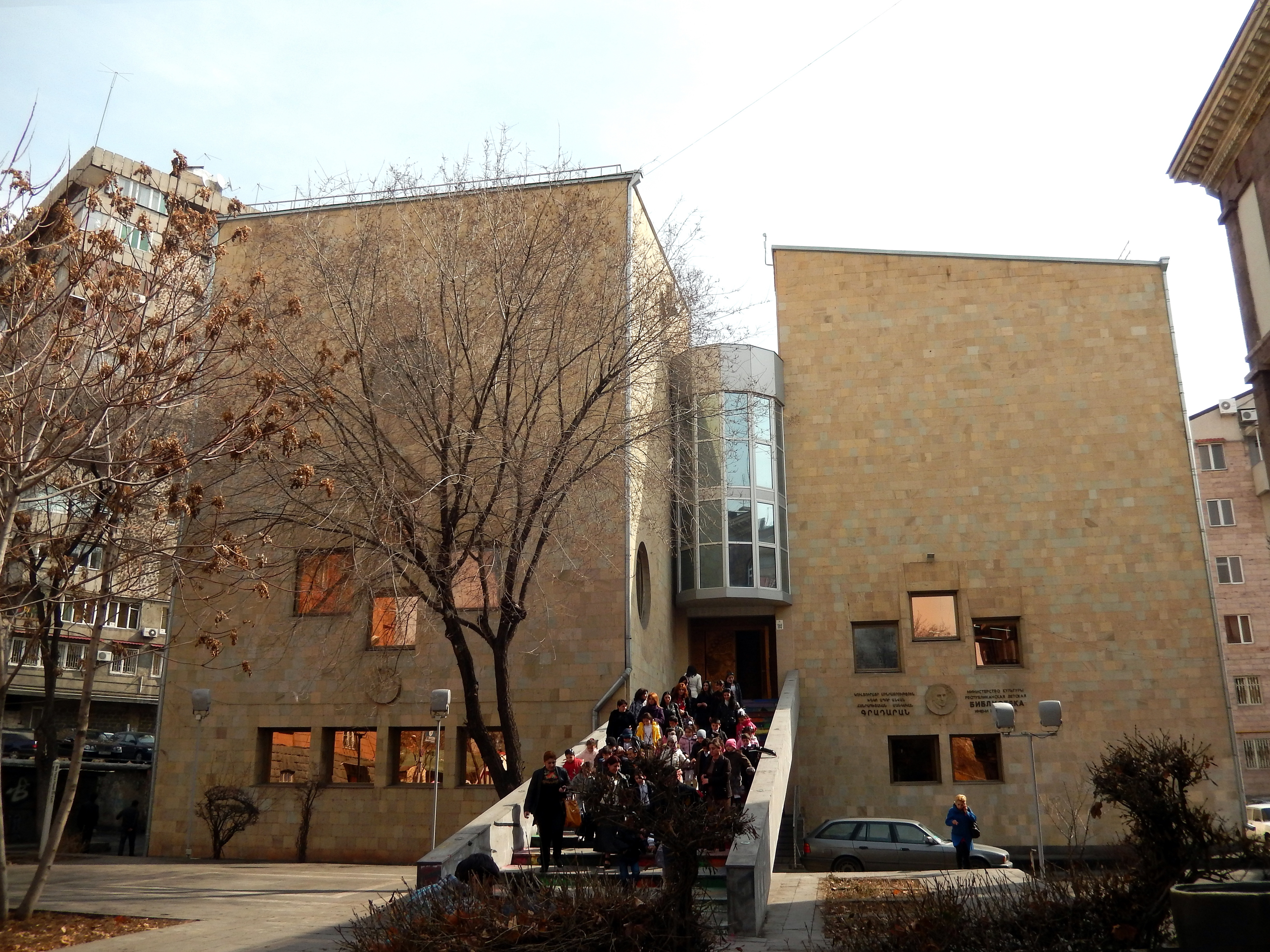 Համահեղինակ` Լևոն Ղալումյան